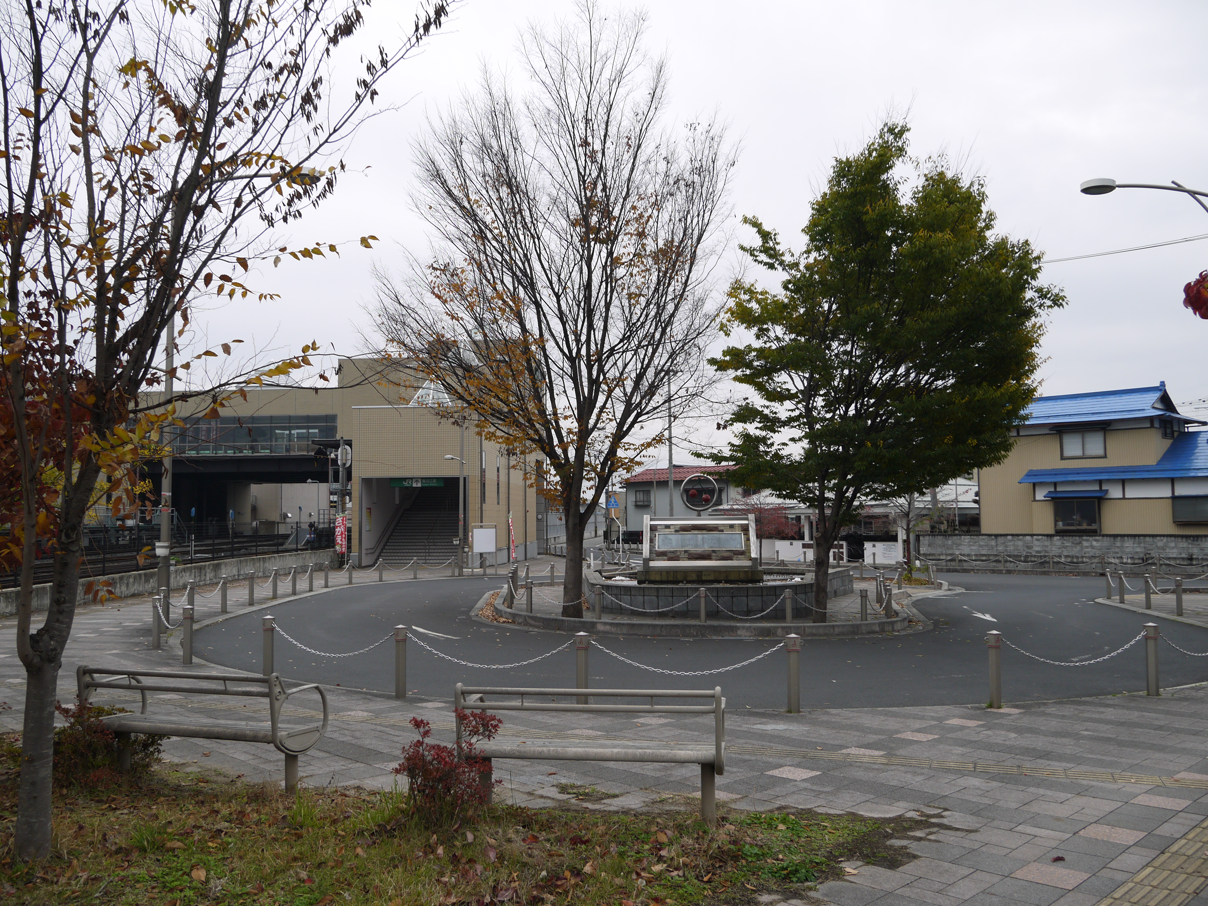 寒河江駅 北側ロータリー